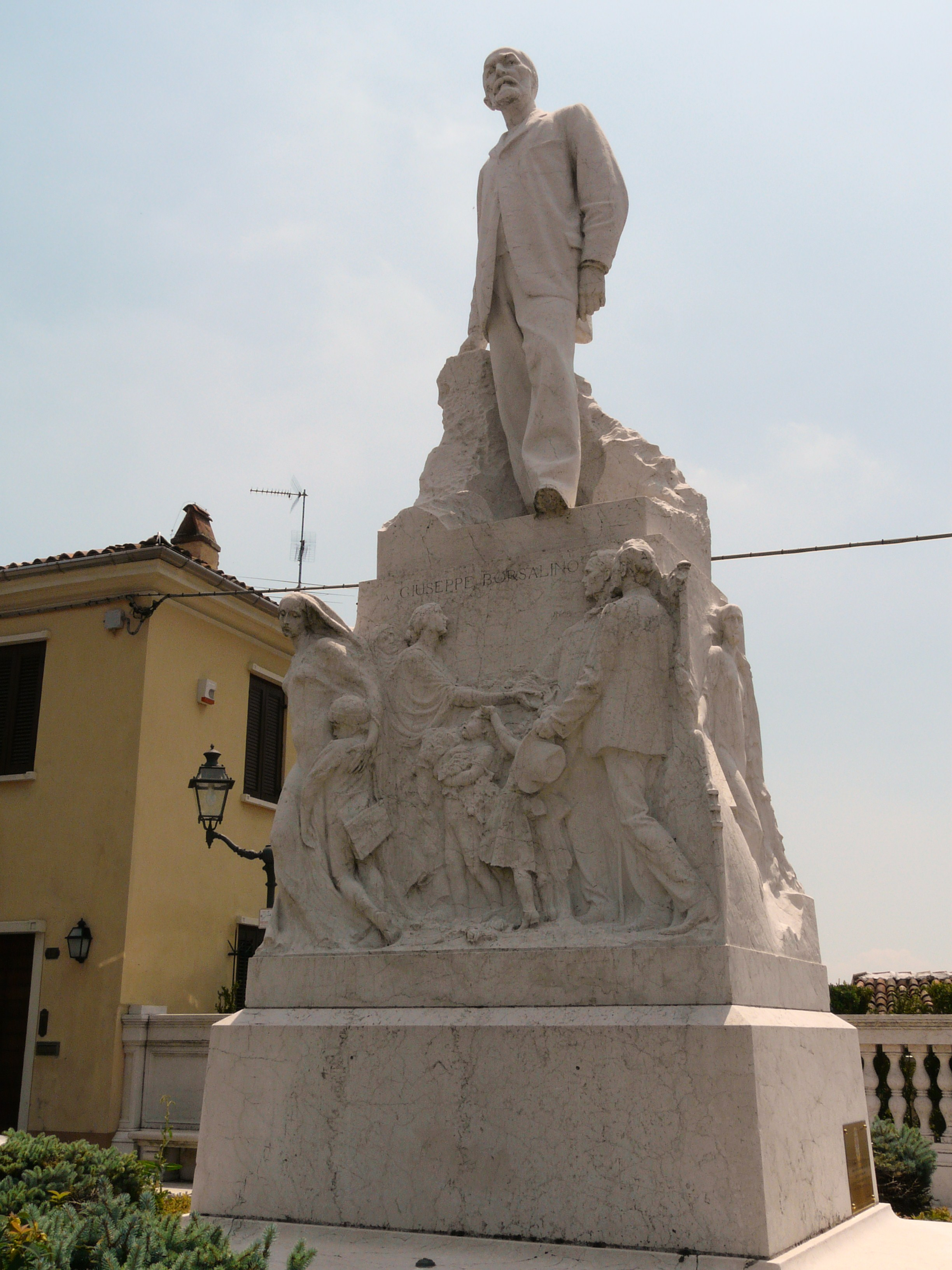 Monumento a Giuseppe Borsalino, Pecetto di Valenza, Piemonte, Italia